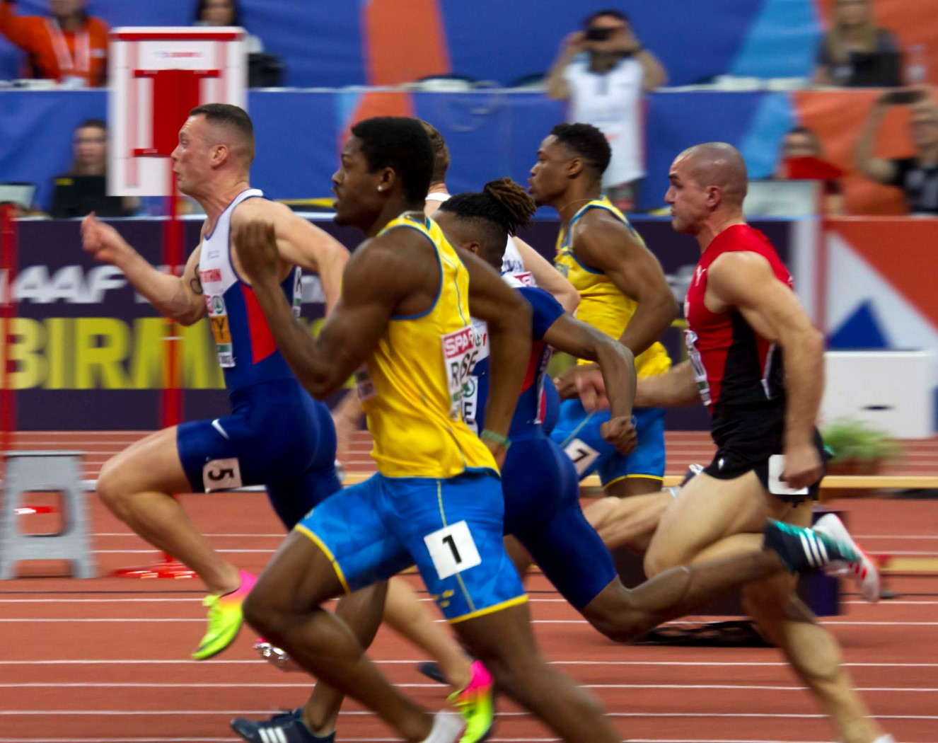 220 fin 60m man